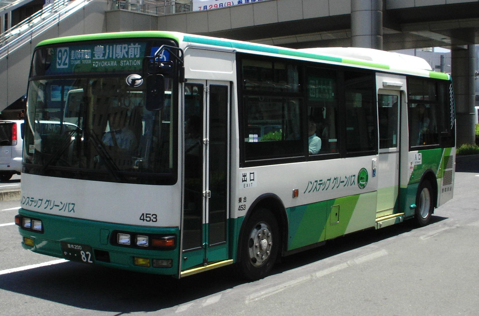 豊鉄バスノンステップ車 グリーンのカラーリング